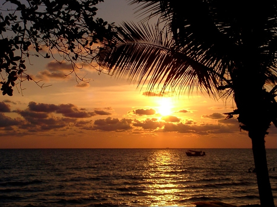 Sunset Koh Chang, Thailand